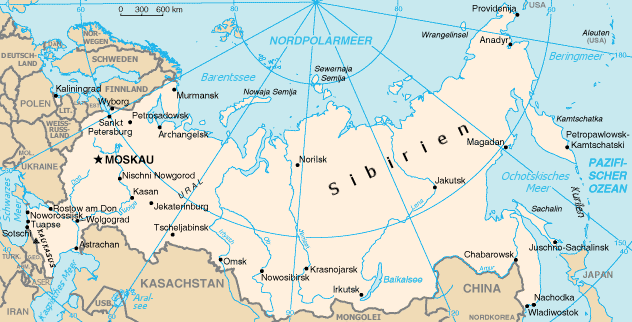 Karte Russland, public domain aus dem CIA World Factbook, von mir übersetzt